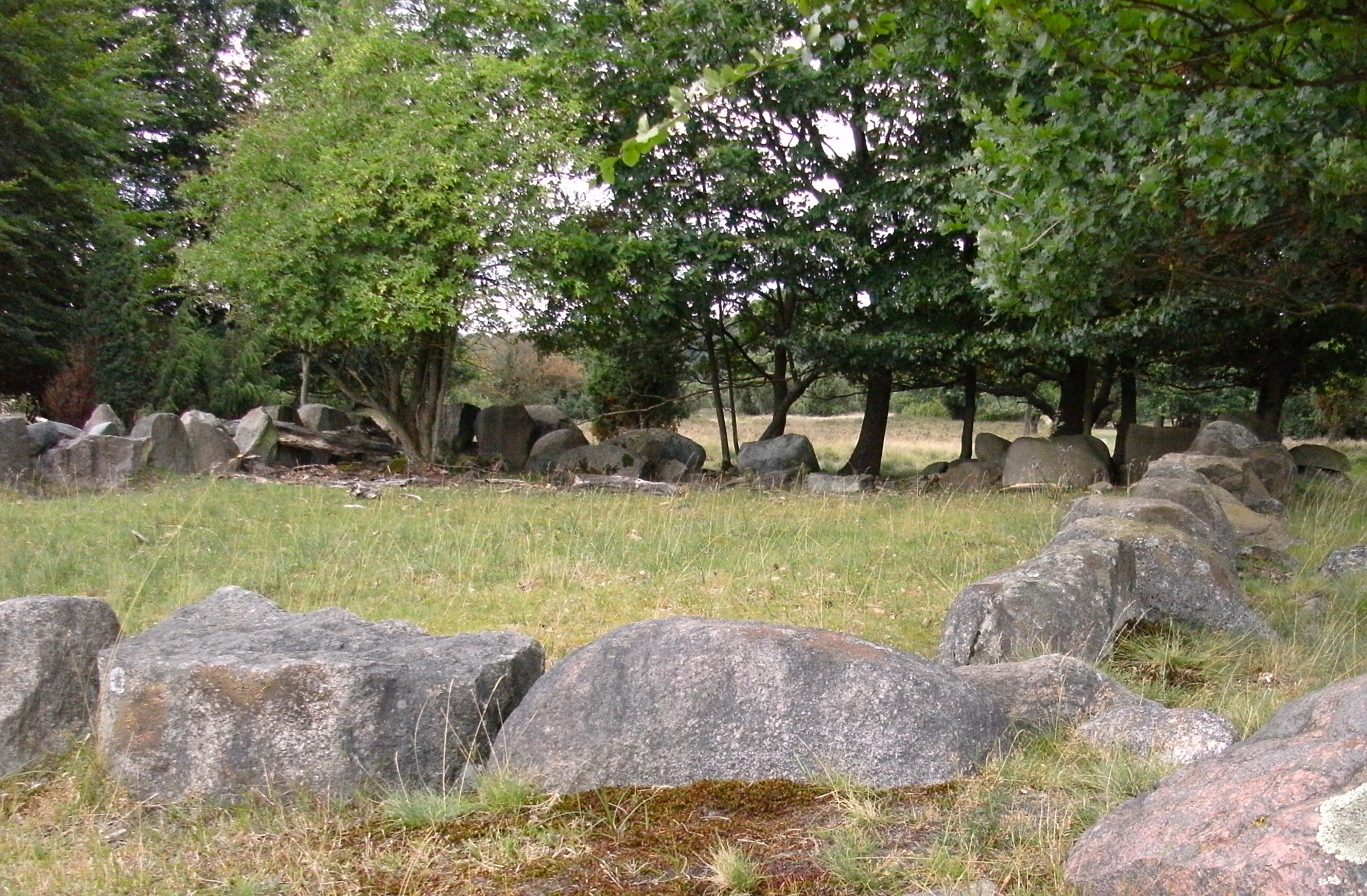 Findlingsfundament eines Schafstalles bei Wilsede